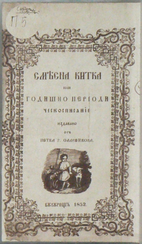 Първо издание на "Смесена китка" на Петко Славейков от 1852 г. Изложено в къщата-музей на Иван Вазов в Берковица, България